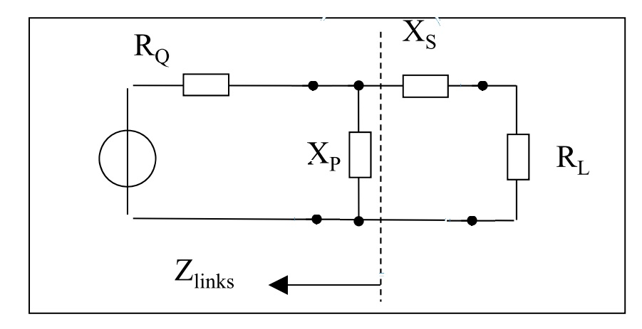 Impedanzanpassung